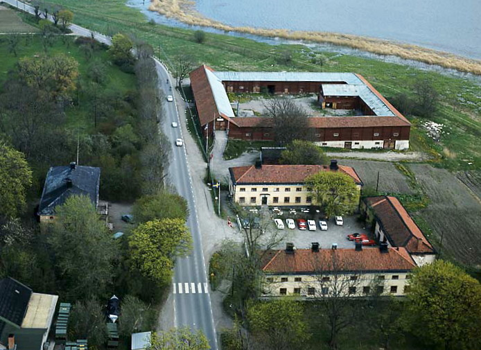 Fittja gård och Fittja loge 1967, vy mot ost